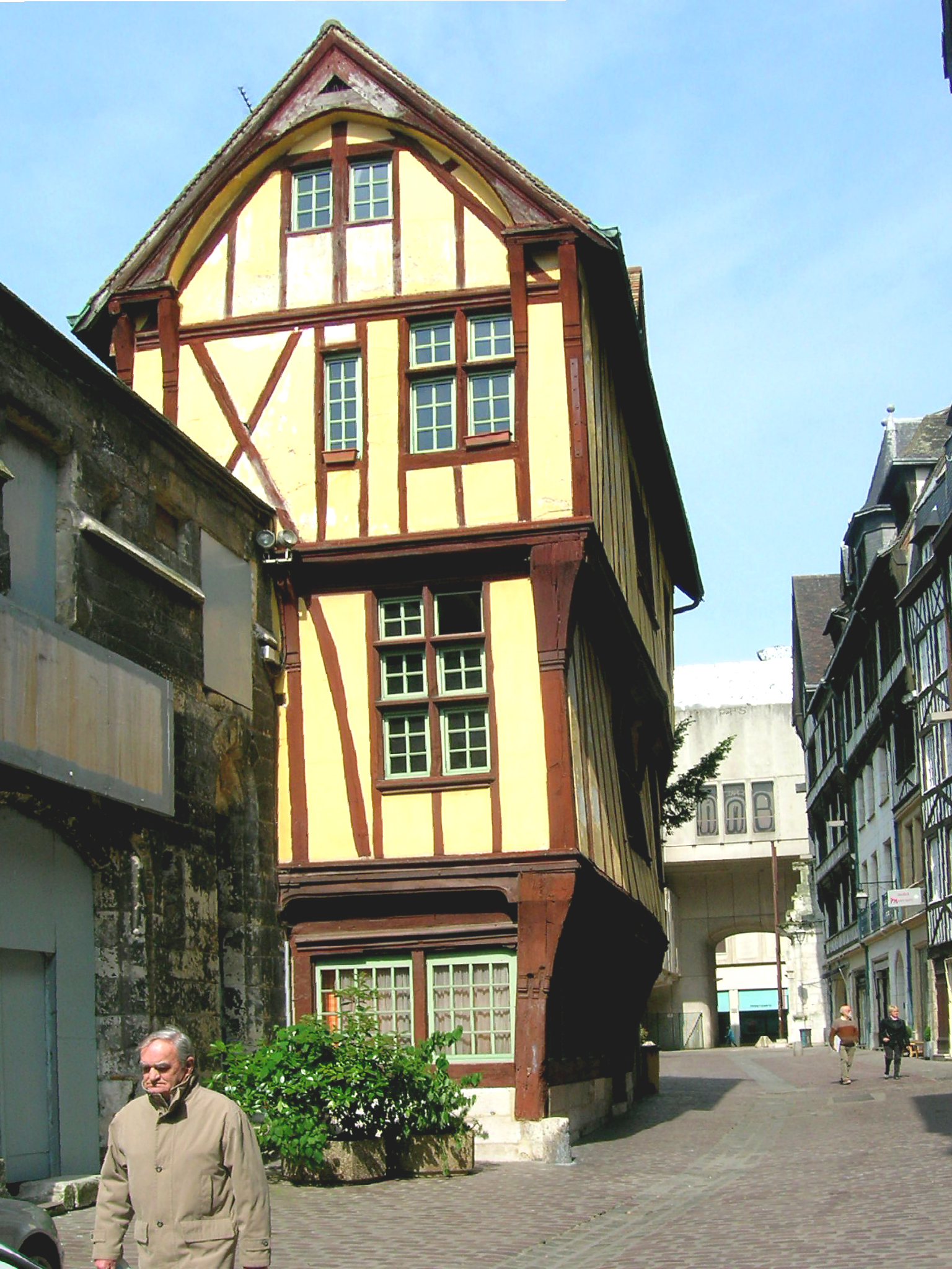 Fachwerkheiser hannert der Kathedral zu Rouen (2006) Lizrnz:GDFL